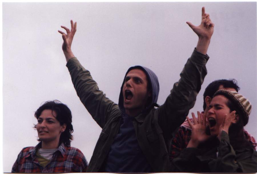 הגרעין הקשה 3